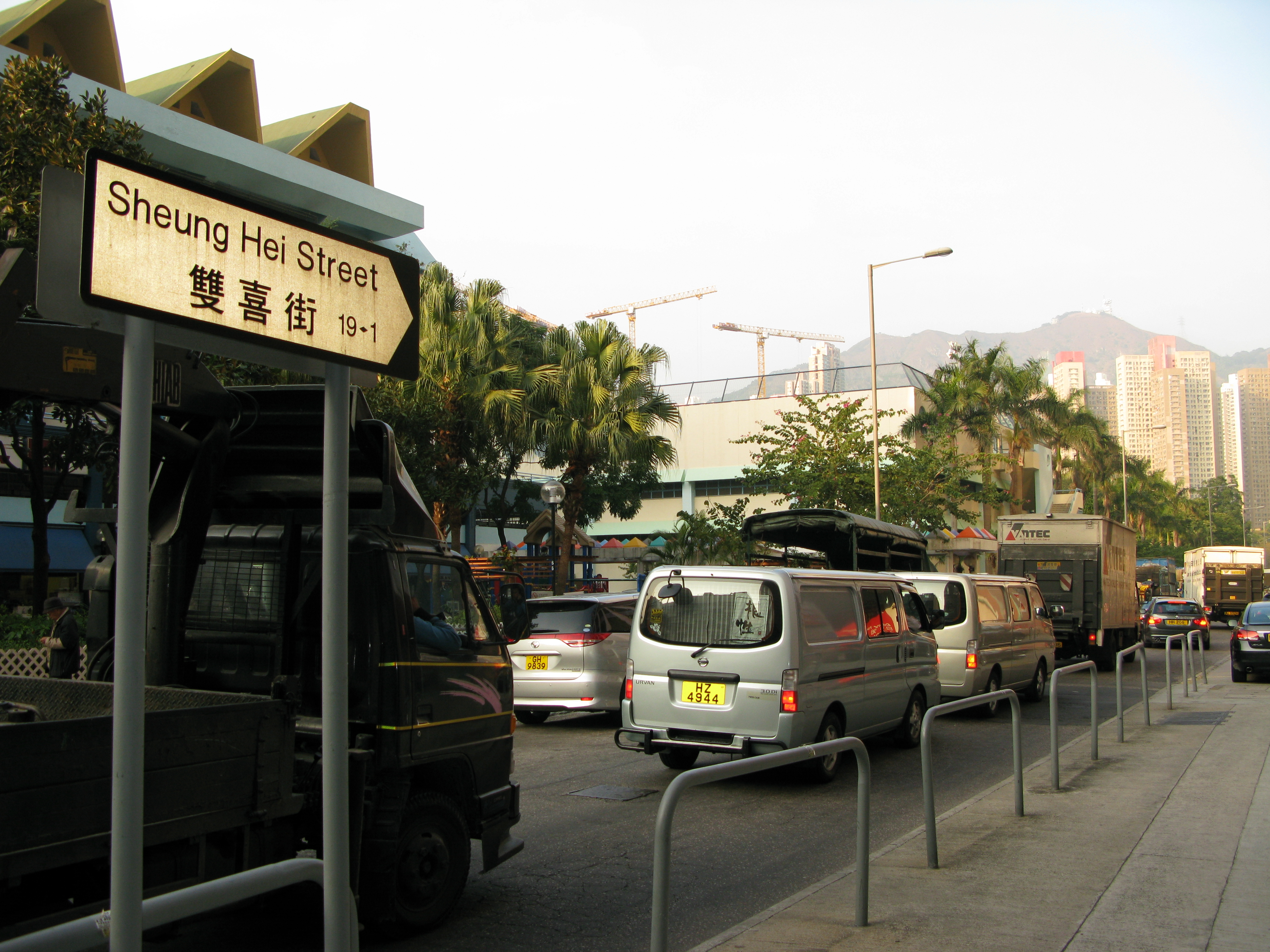 中文（香港）: 香港新蒲崗雙喜街